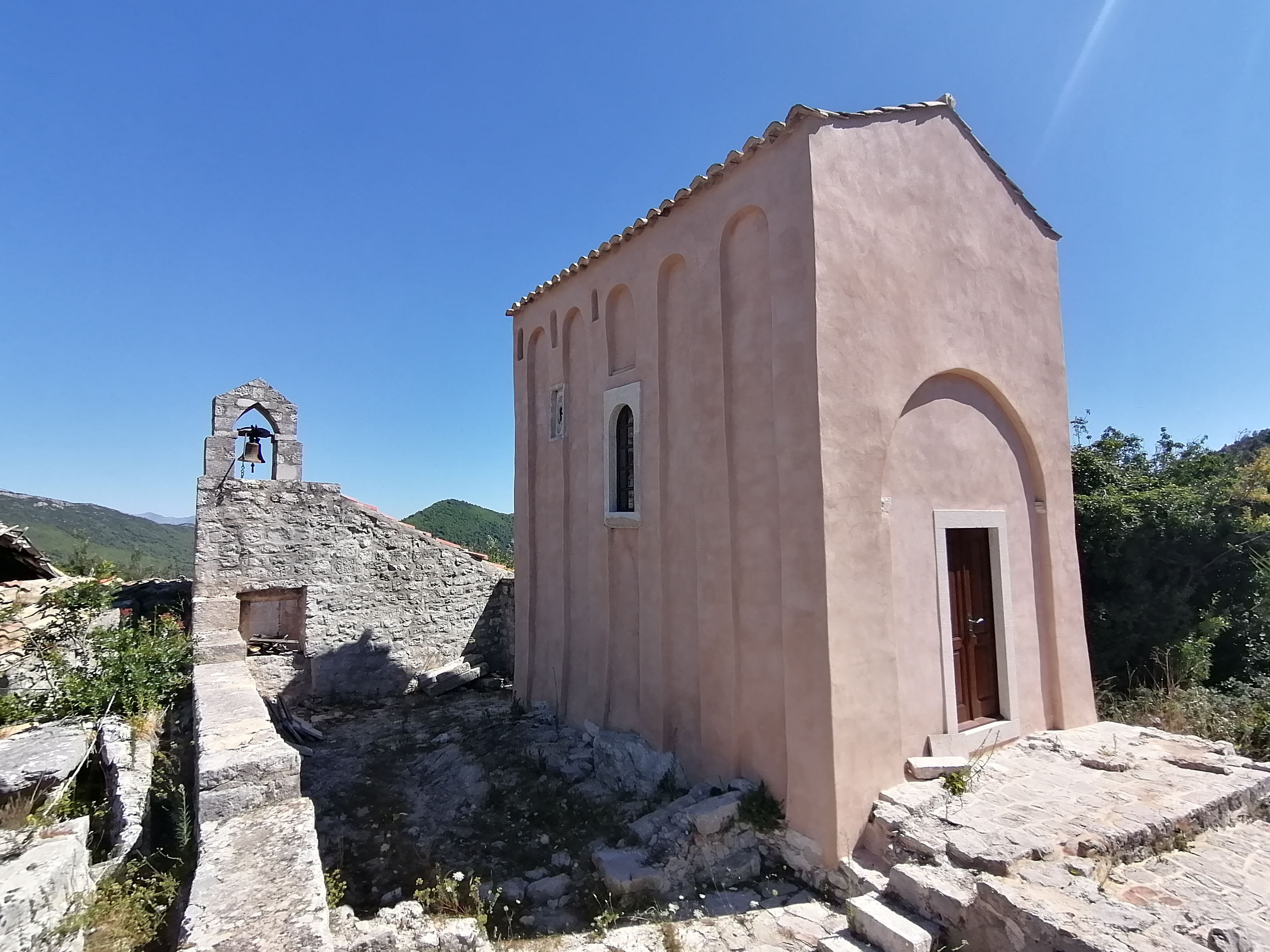 Crkva sv. Mihajla kod Stona - Pročelje